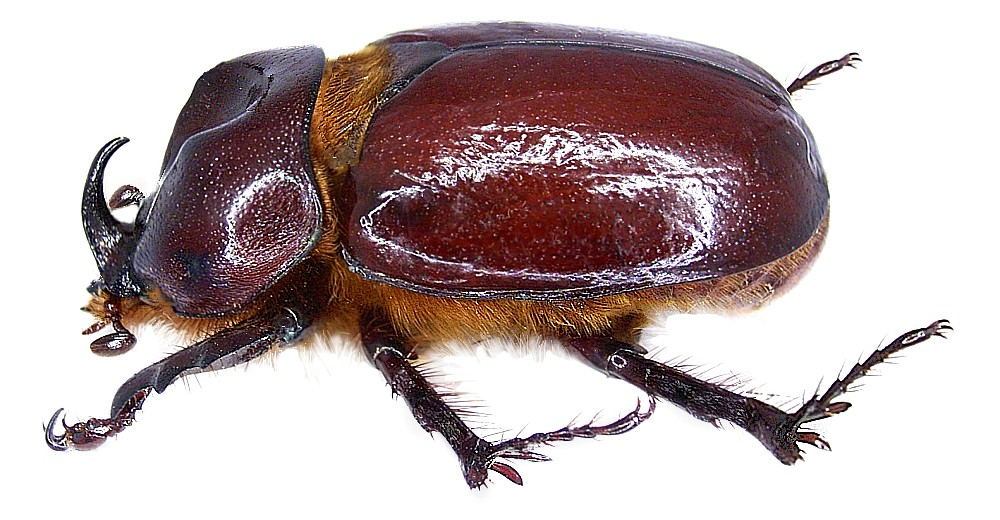 Familie: Scarabaeidae Grösse: 15-25 mm Verbreitung: Südeuropa, Osteuropa, Nordafrika Fundort: Tunesien, Djerba, Mezghaya leg. det. U.Schmidt, 2007 Foto: U.Schmidt, 2007